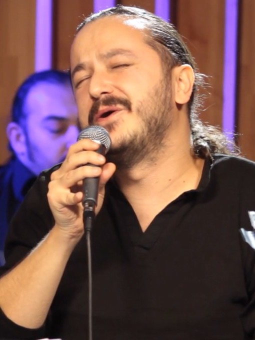 Akustikhane'de Güvenç Dağüstün